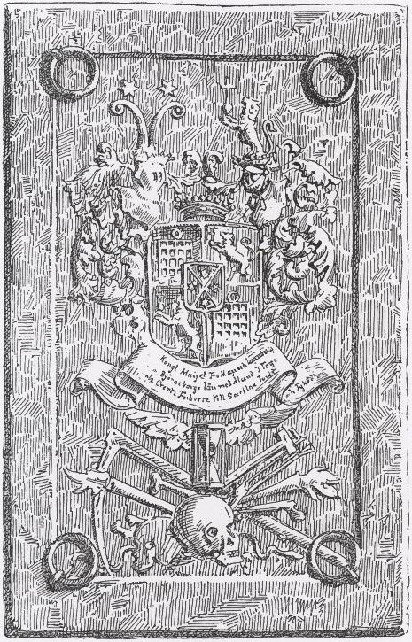 Lorentz Creutz den yngre, född 31 mars 1646 i Finland, död 7 februari 1698, var en svensk friherre och ämbetsman. Han skrev sig till Sarflax, Tjusterby och Tykö. Lorentz Creutz var son till Lorentz Creutz d.ä. och friherrinnan Elsa Duwall, samt bror till Johan Creutz och Carl Gustaf Creutz. Efter studier i Åbo och Uppsala blev Lorentz Creutz auskultant i Bergskollegium. Han studerade bergsvetenskap på resor runt om i Europa 1662-1668. 1669 blev han marskalk vid ambassaden i Polen och 1675 landshövding i Västerbottens län. Han utnämndes till vice president i Bergskollegium 1680 blev 1683 landshövding i Åbo och Björneborgs län. Som chef för det finska bergväsendet arbetade Creutz ivrigt för bergsnäringens utveckling och anlade själv bland annat järnbruk i Kauttua och Forsby. Lorentz Creutz d.y. gifte sig första gången 1671 med Ebba Maria Fleming, och gifte om sig 1684 sedan han blivit änkling med Hedvig Eleonora Stenbock (1664-1729), dotter till riksrådet och fältmarskalken Gustaf Otto Stenbock. Han fick fyra barn i första äktenskapet och tio barn i andra.